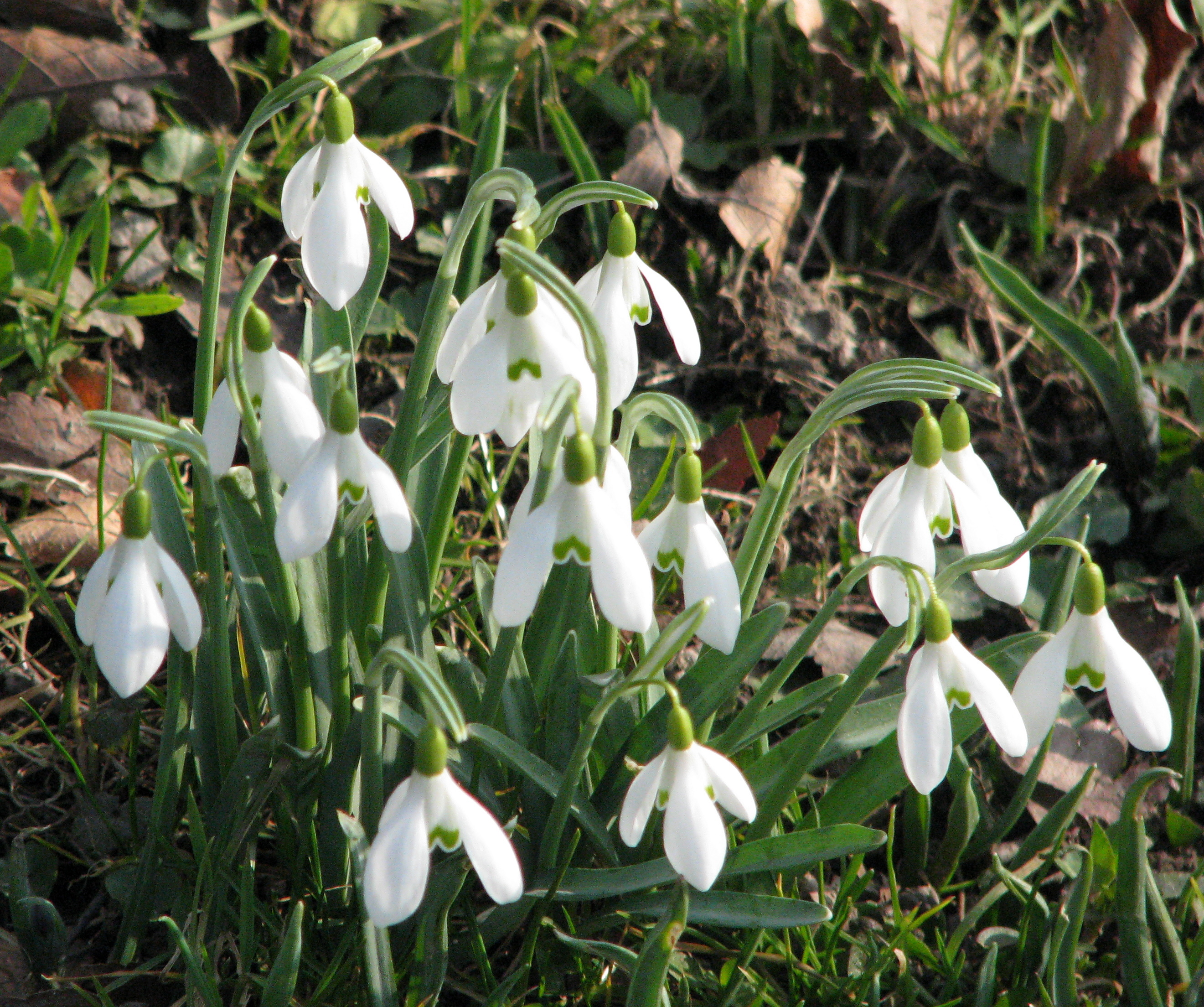 Zvončki